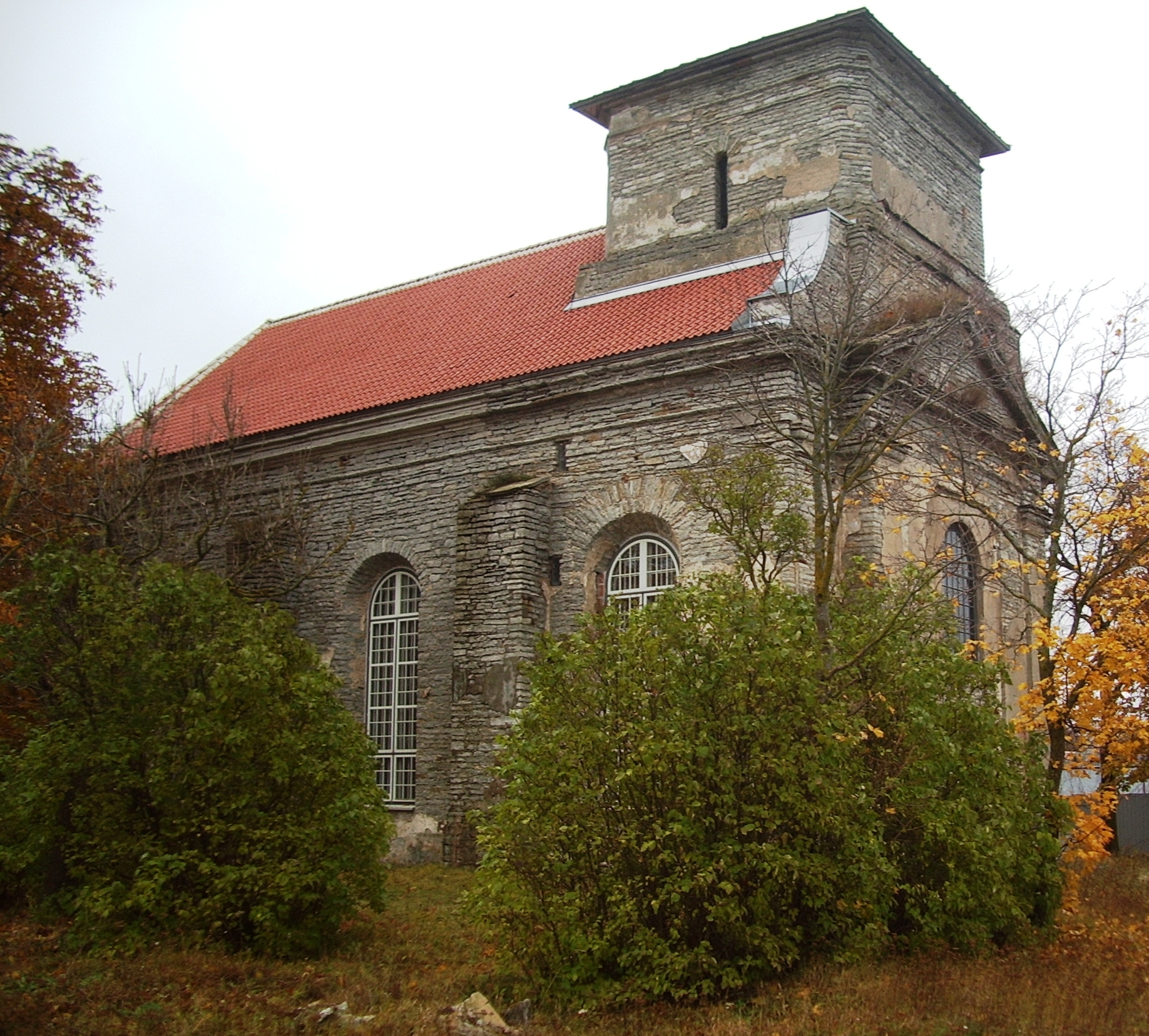 EAÕK Georgi kirik Pakri 2